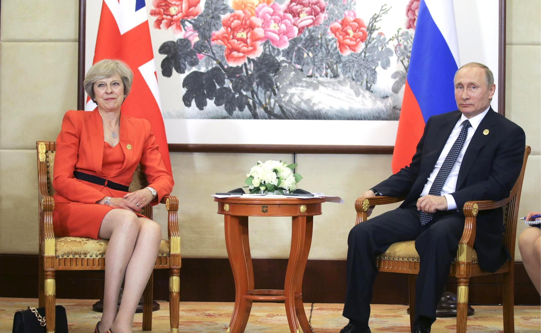 Президент России Владимир Путин с Премьер-министром Великобритании Терезой Мэй